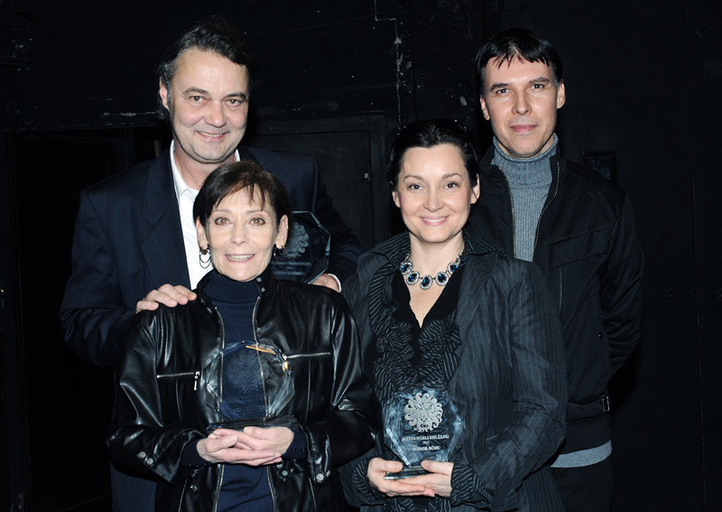 Az első Szepes Mária-díjátadás díjazottjai (Venczel Vera színésznő, Bodor Böbe színész-rendező és Lőrinczy Attila író-dramaturg) valamint a Szepes Mária Alapítvány elnöke, Almási Csaba